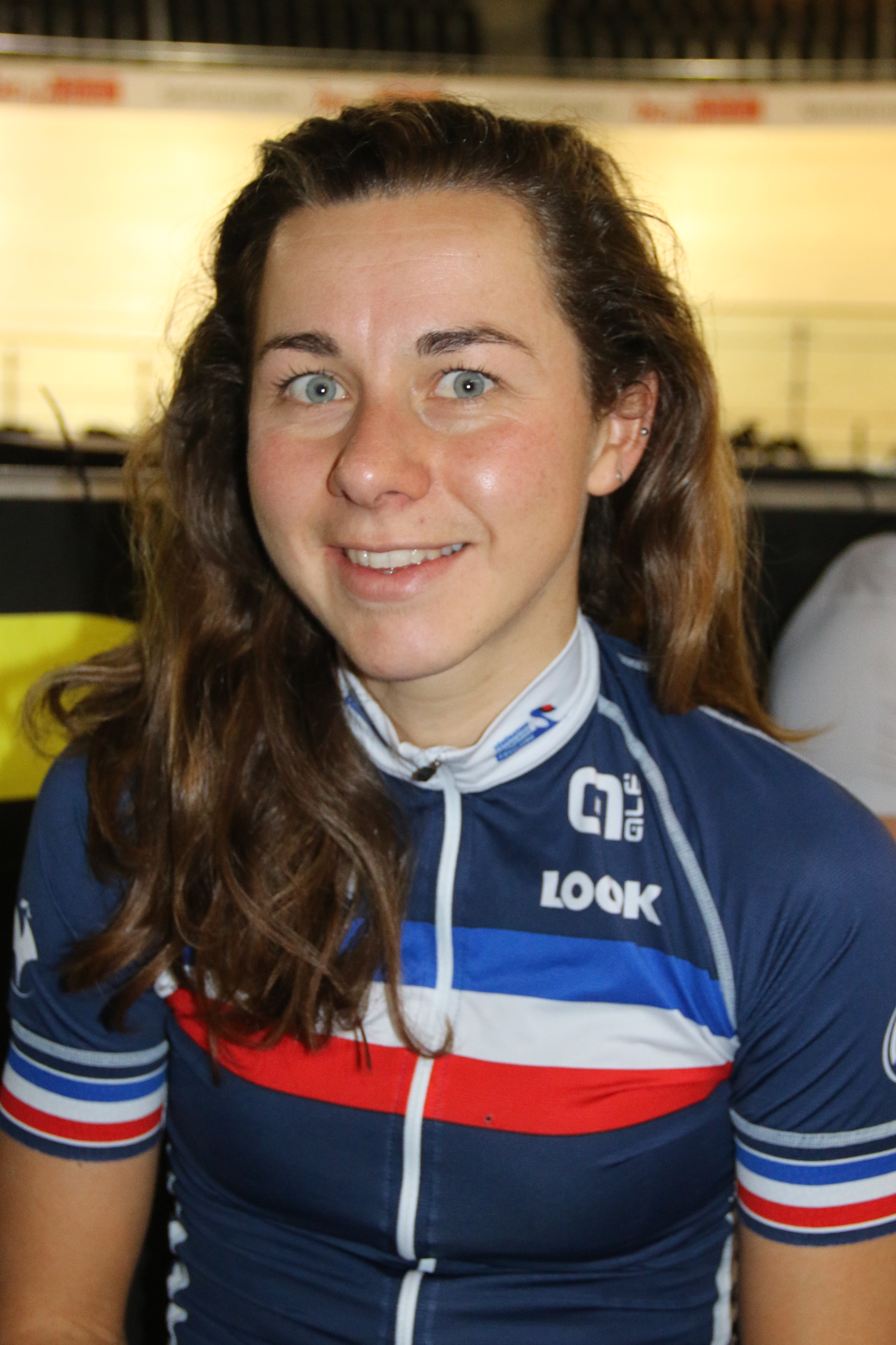 Élise Delzenne, französische Radsportlerin